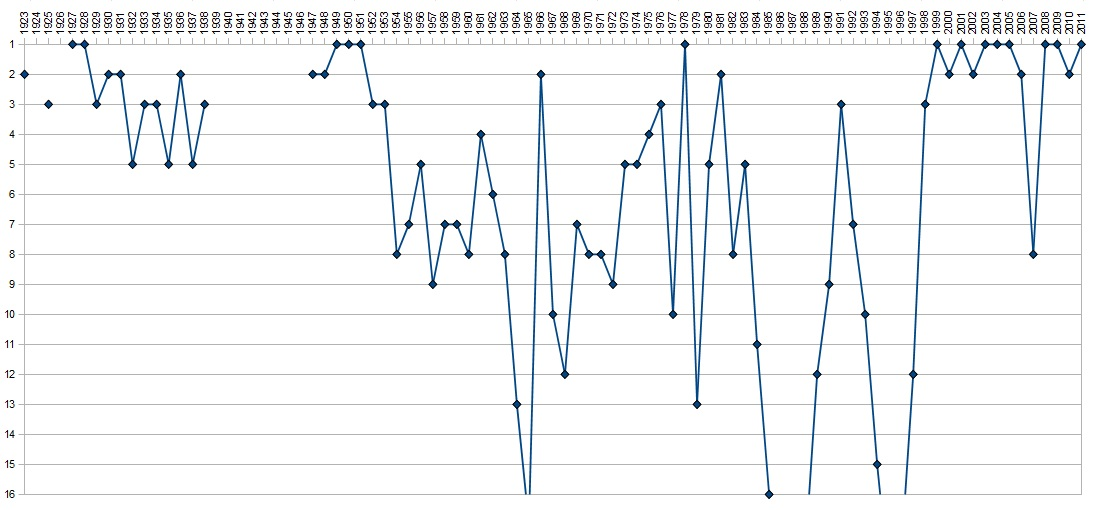 Historia wyników Wisły Kraków w ekstraklasie